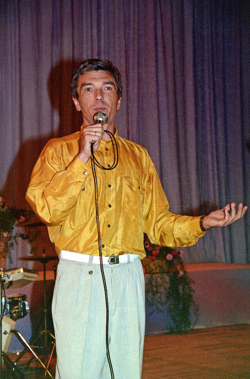 Юрий Александрович Николаев выступает в культурном центре «Славич» в день 60-летия ОАО «Компания Славич».